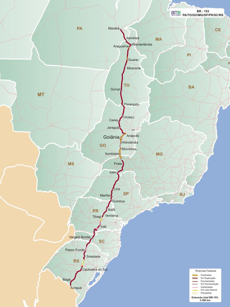 Mapa descritivo da BR-153.